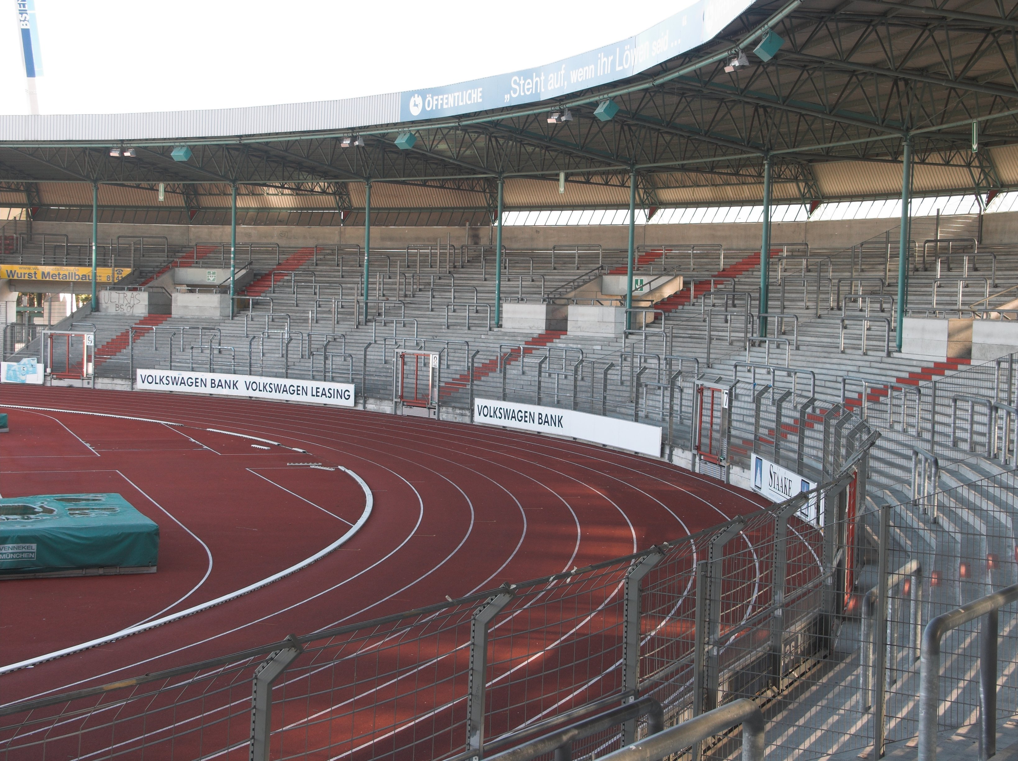 Eintracht Braunschweig Stadion Suedkurve